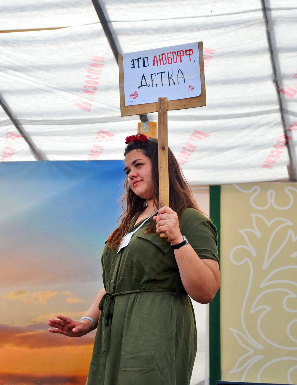 Анна Аржанова с темой мини-беседы "Это любофф, детка"